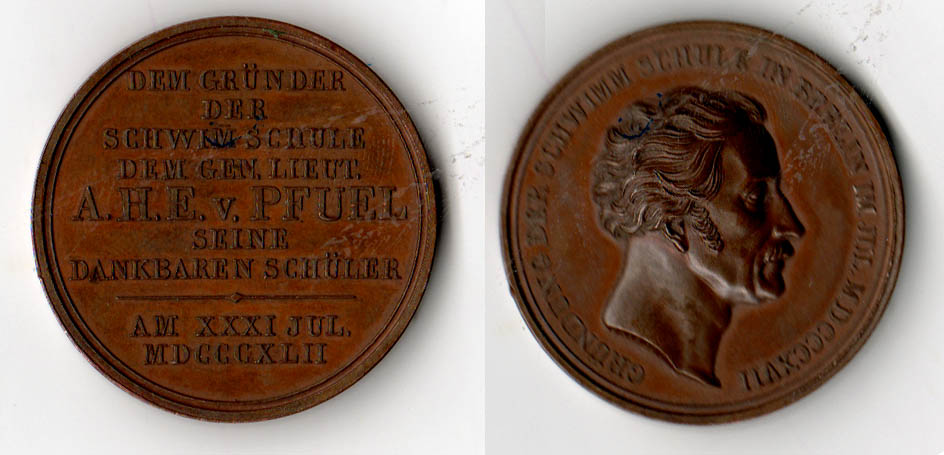 Ernst von Pfuel (1779-1866), königlich-preußischer General der Infanterie, ein Reformer des Militärsports und kurzzeitig Gouverneur von Berlin sowie preußischer Ministerpräsident und Kriegsminister.